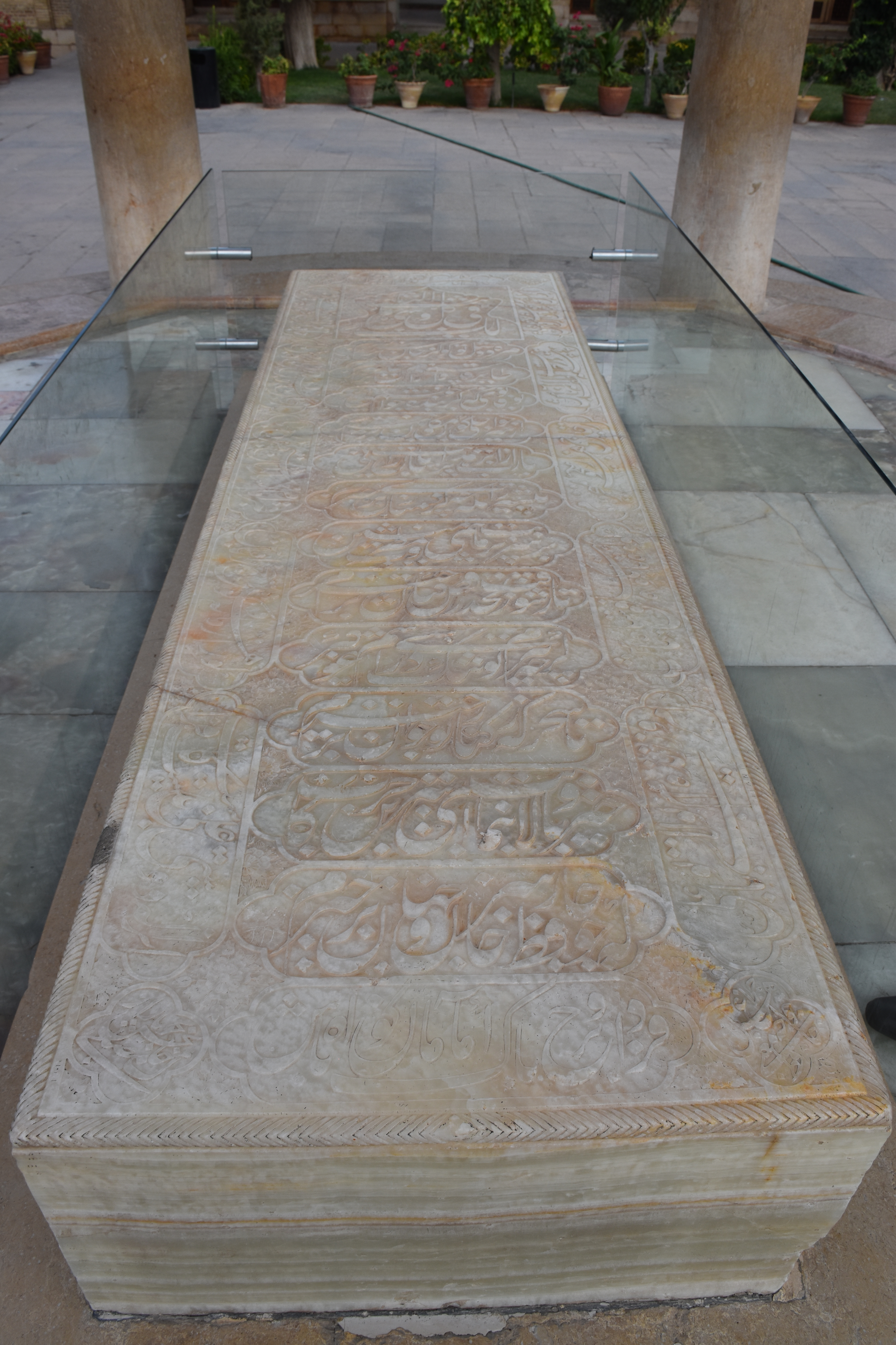 حافظیه